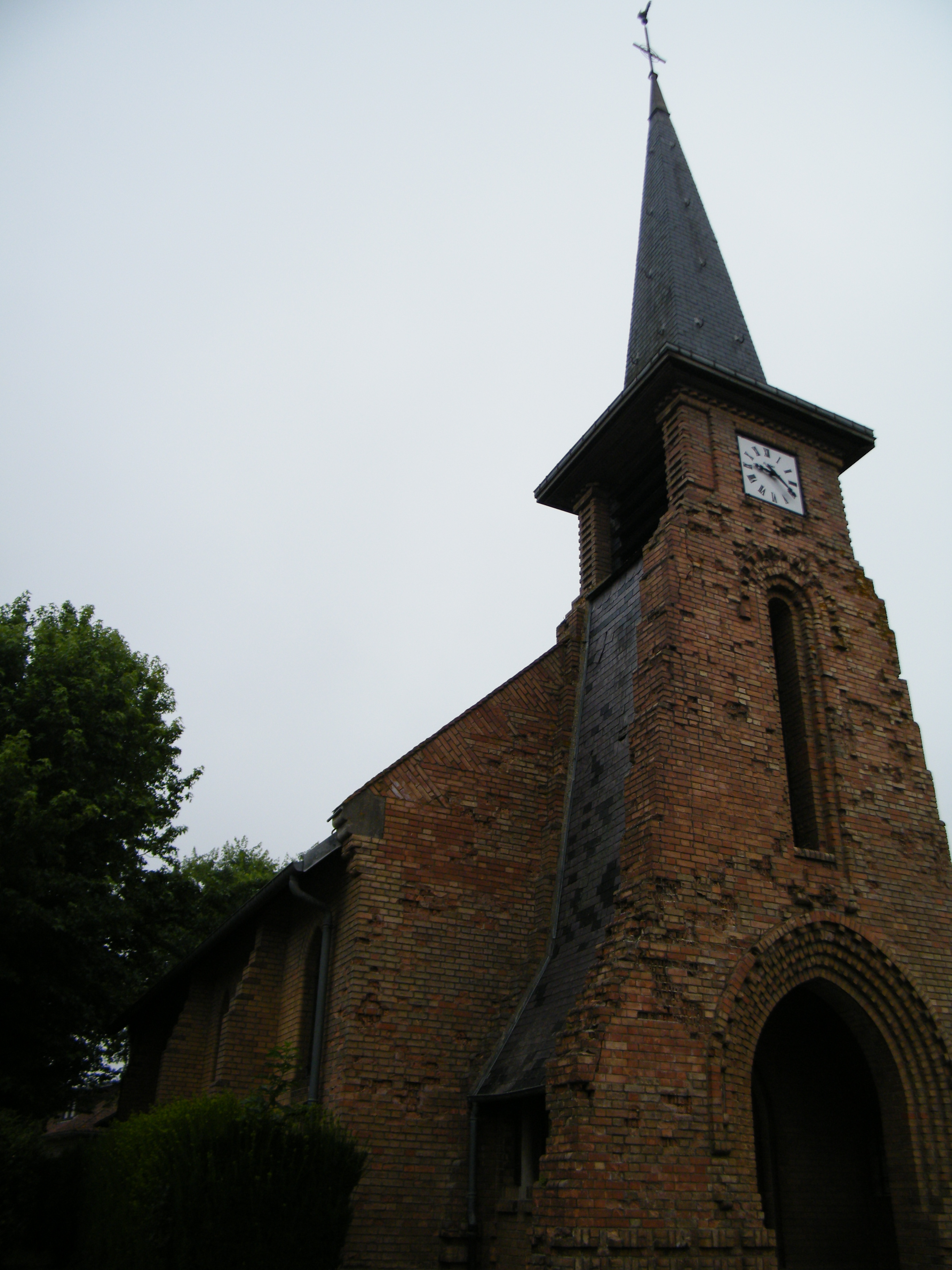 Église Saint-Thomas (Warfusée).